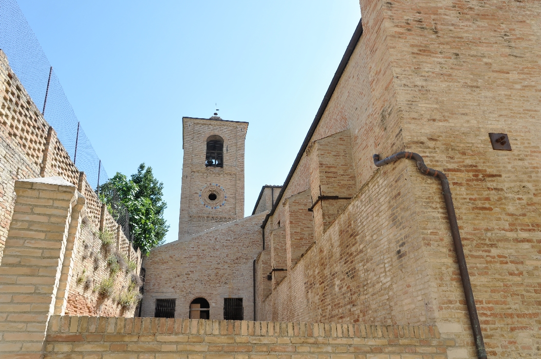 Penne (comune, Italy) 2012